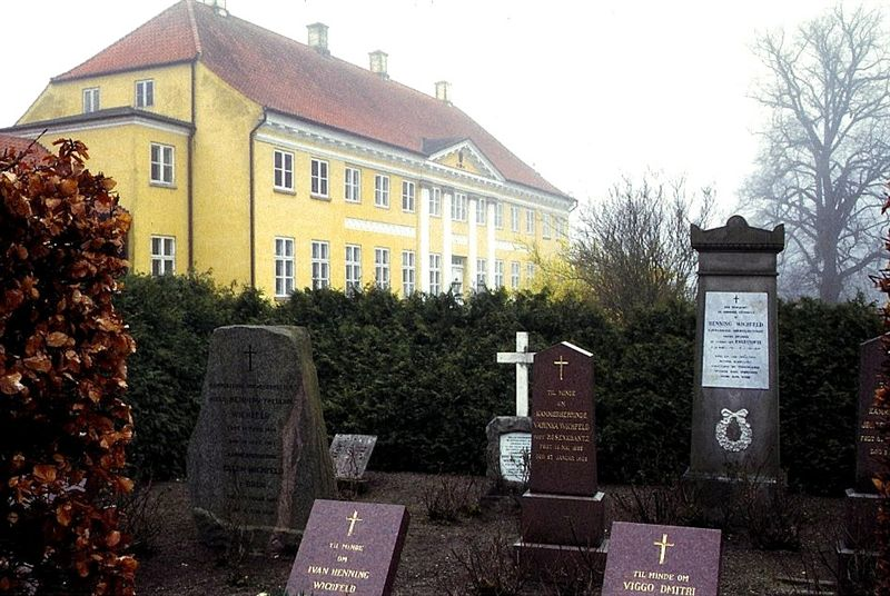 Engestofte Kirke i Danmark. Engestofte herregård